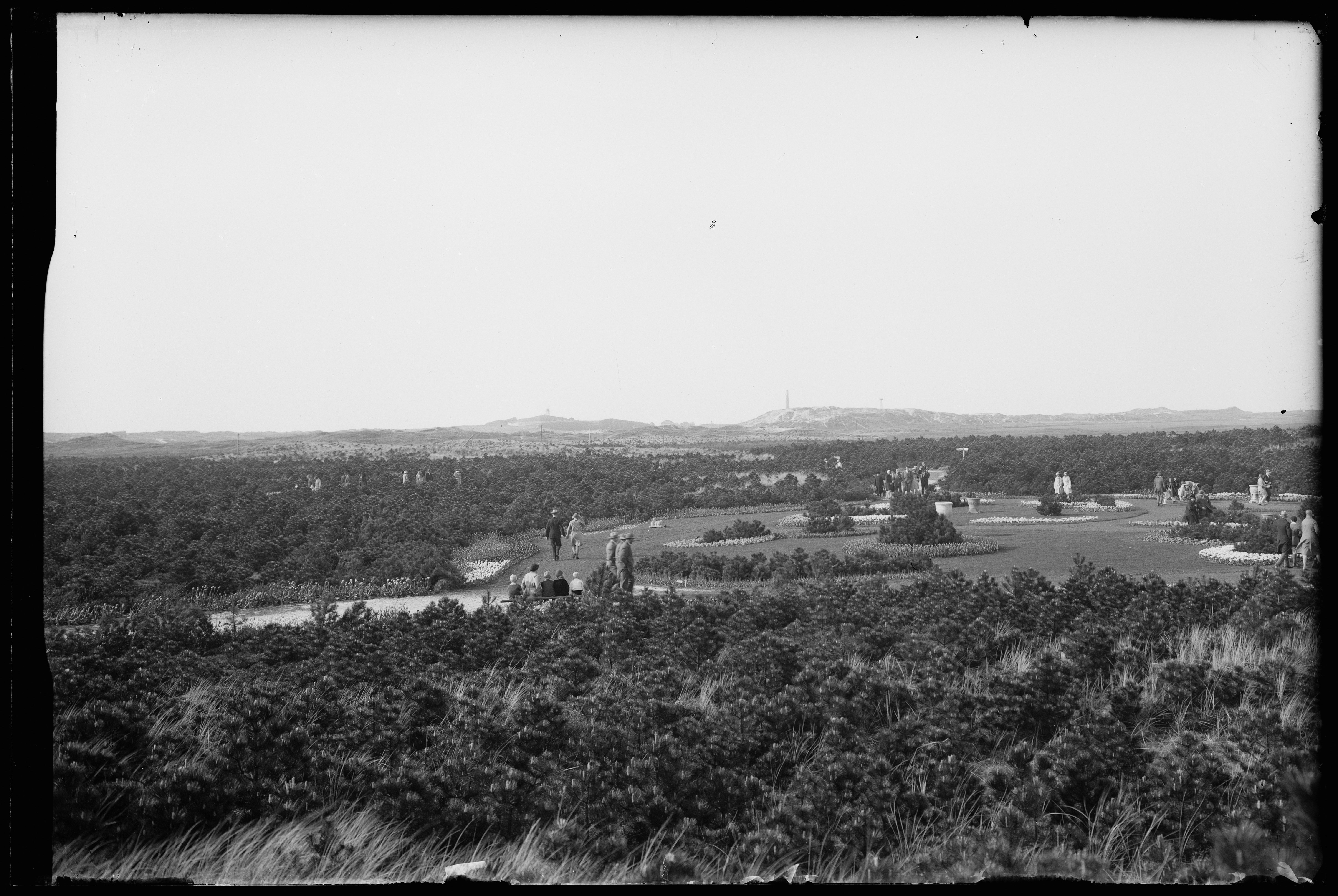 Wandelaars tussen bloembollenperken in het jonge bos de Donkere Duinen met op de achtergrond de Grafelijkheidsduinen en de vuurtoren Den Helder 1931 Catalogusnummer: RAA003012854 Collectie Regionaal Archief Alkmaar